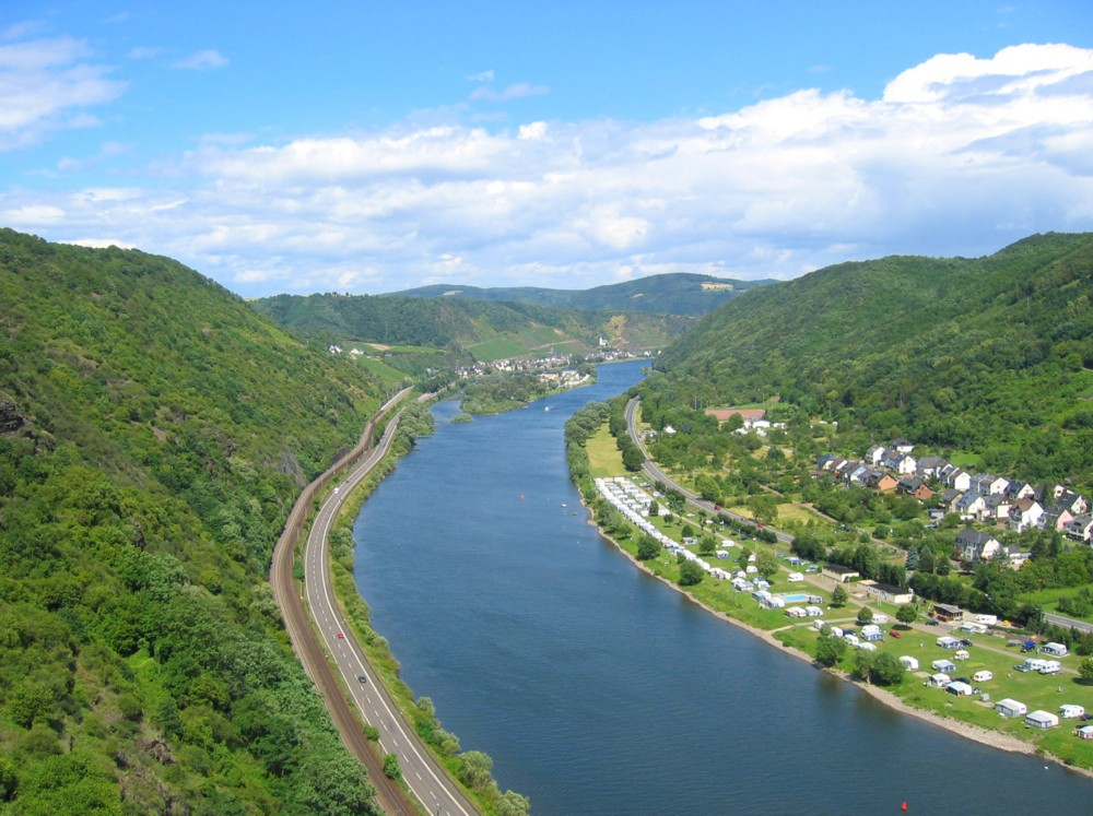 Bildbeschreibung: Burg Bischofstein, Hatzenport, Mosel Quelle: selbst fotografiert Datum: 03.07.2004 Fotograf/Zeichner: DER UNFASSBARE